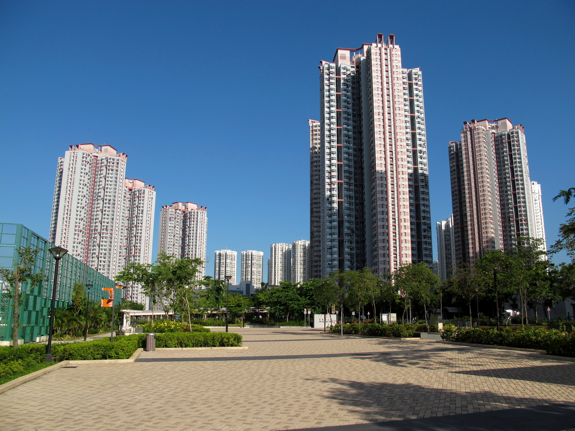 Tin Ching Estate 天晴邨